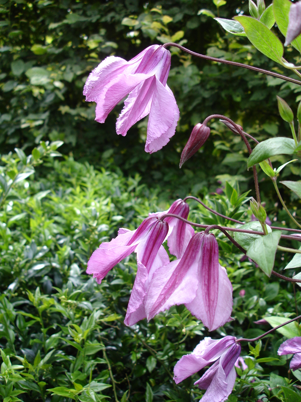 Clematis 'Aljonushka'